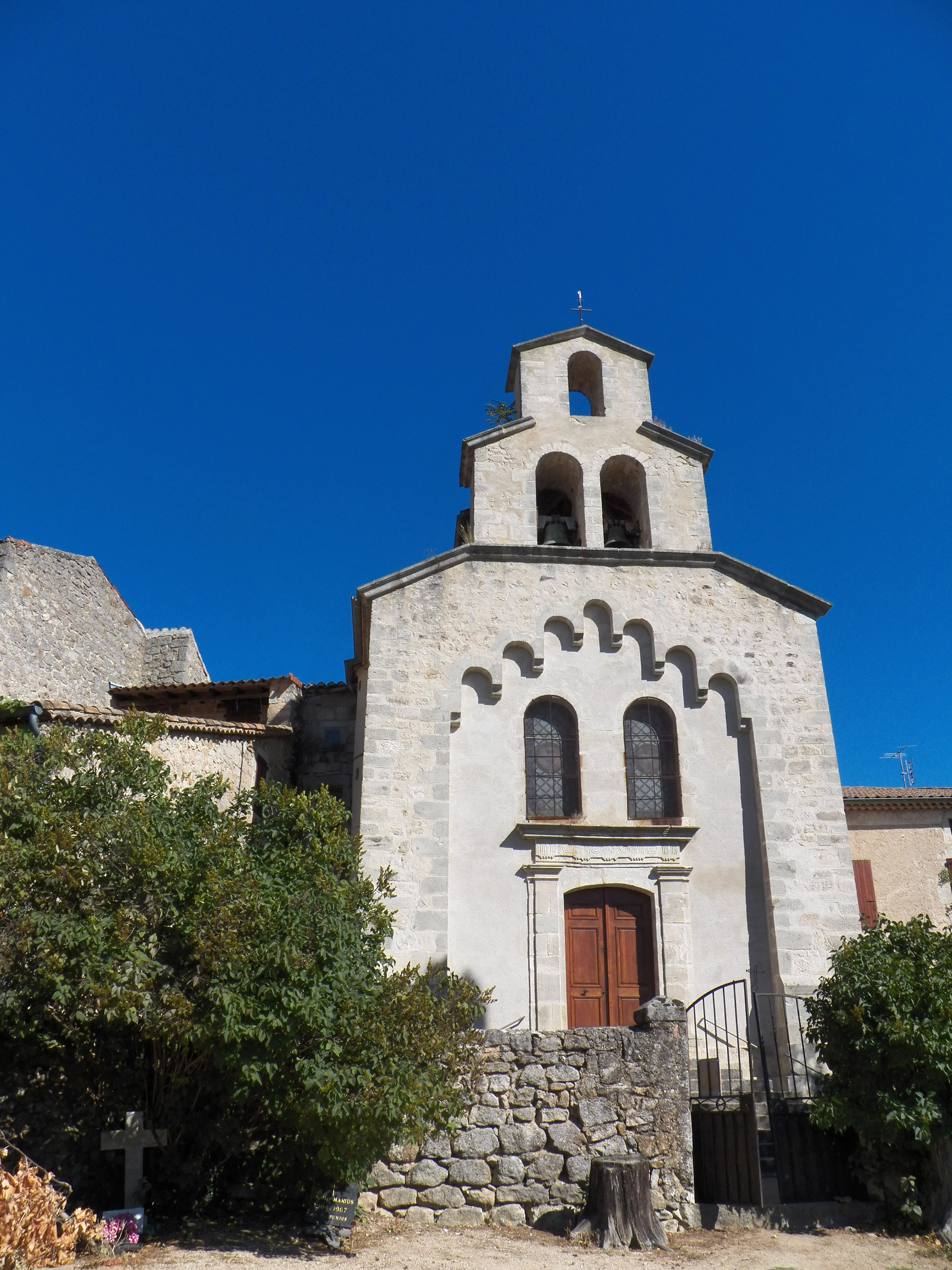 Le vieux vilage de Montréal et son église